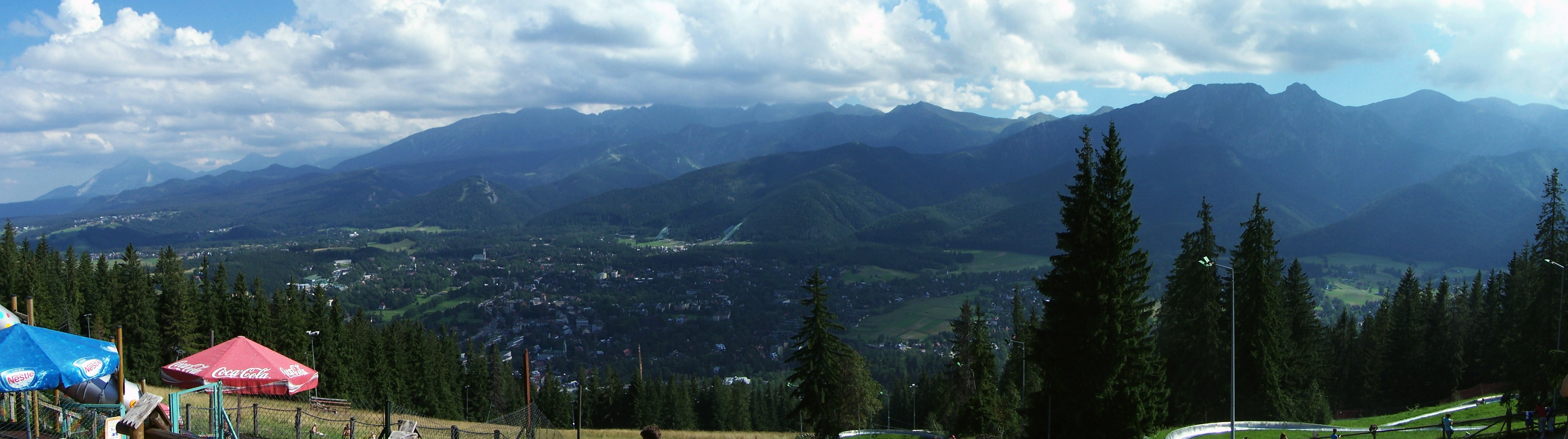 Panorama z Gubałówki